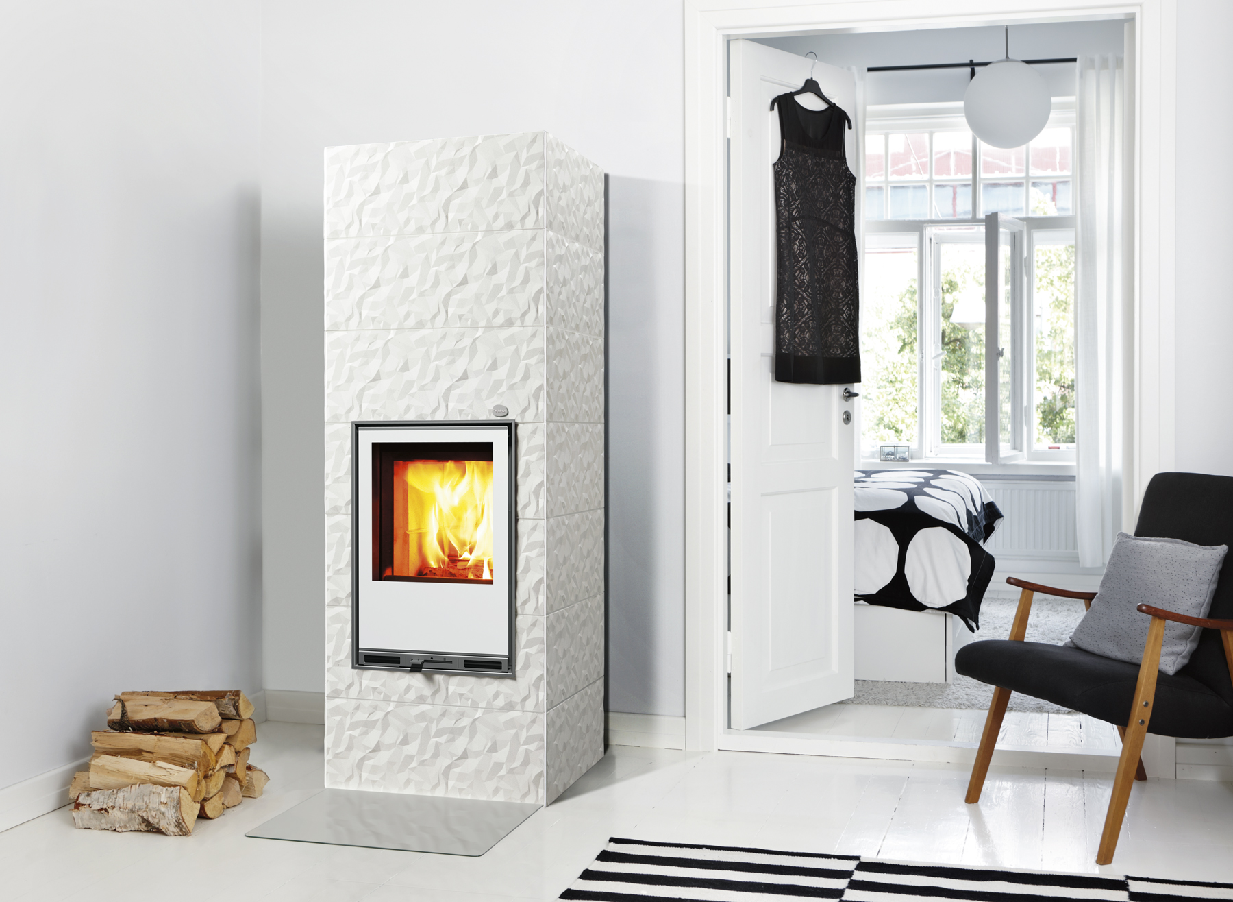 Tulikivi Kide 2 valkoinen